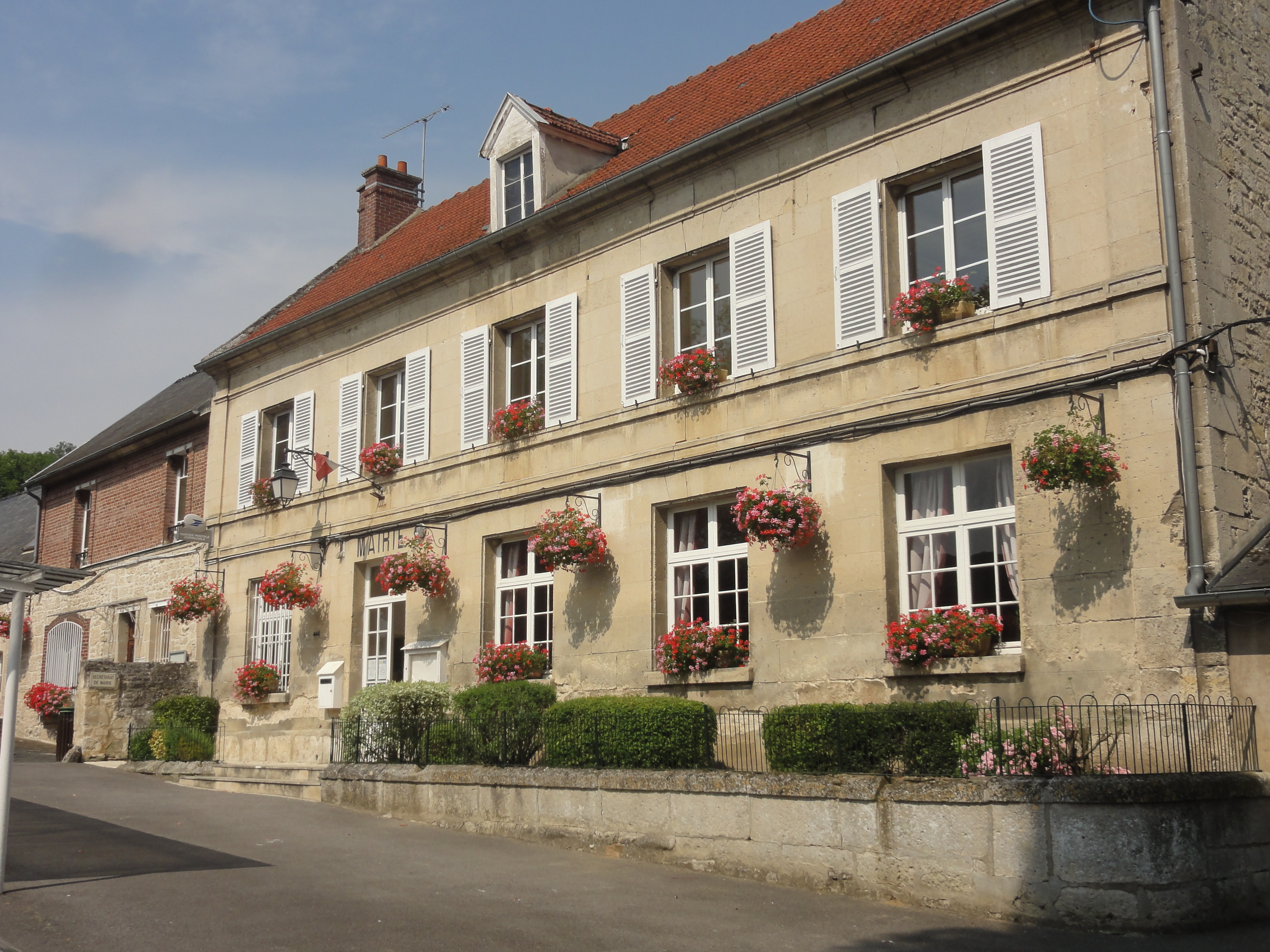 Mairie, rue de la Poste.